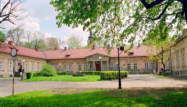 Andrychów Palace (Polska)